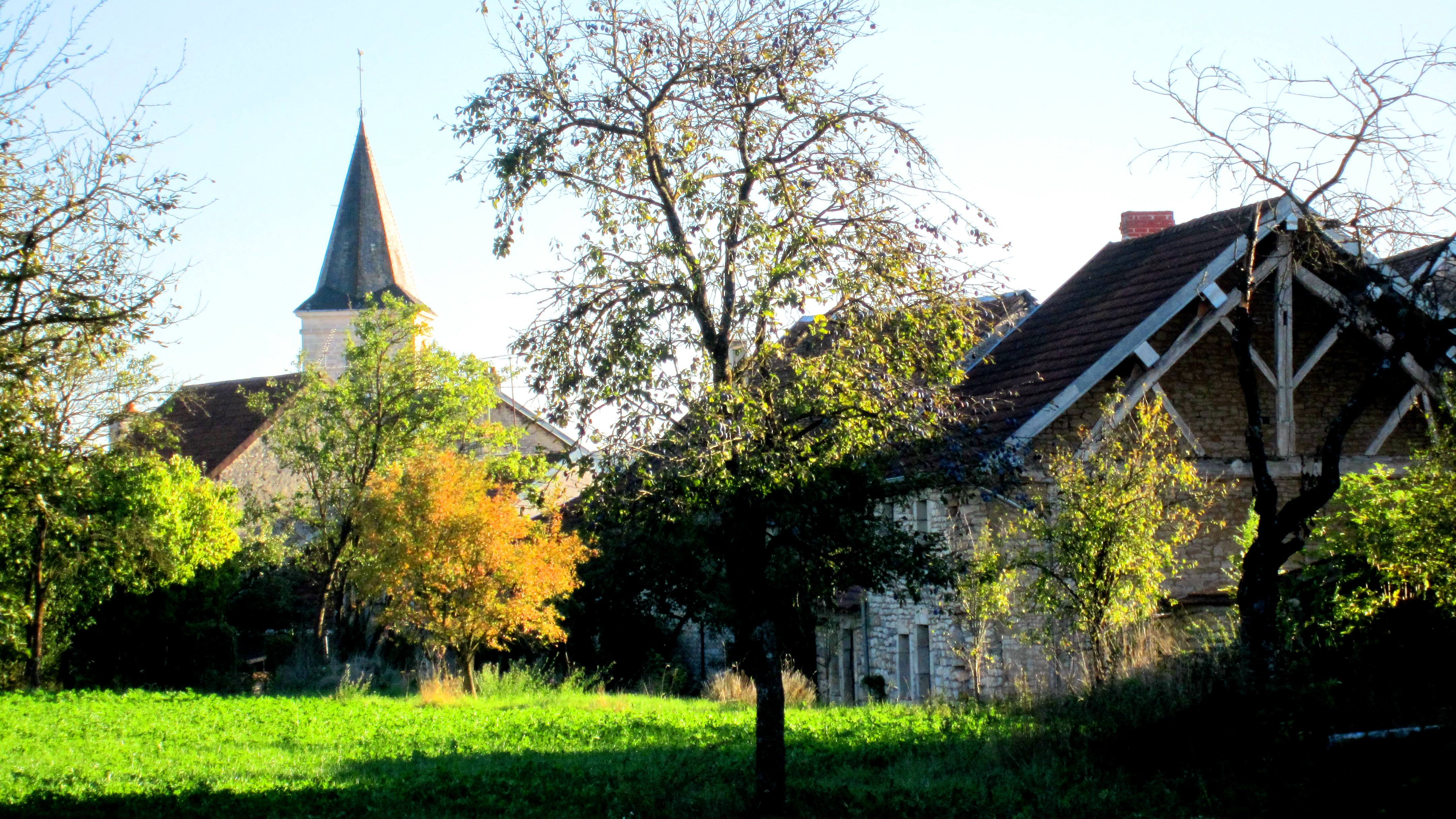 Lucey (Côte-d'Or)